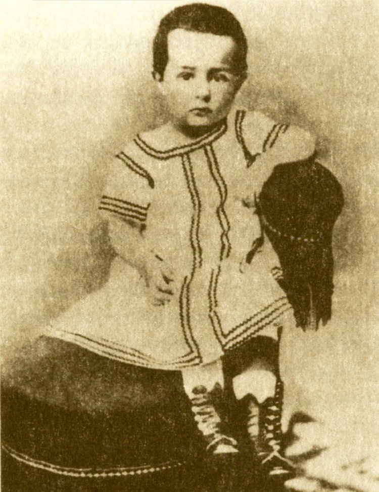 Malý Henry de Toulouse-Lautrec